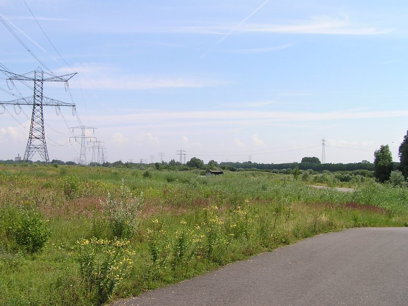 Op de Diemerzeedijk is nu het Diemerpark aangelegd, met fietspaden. De hoogspanningsleidingen voeren naar de elektriciteitscentrale bij Diemen.